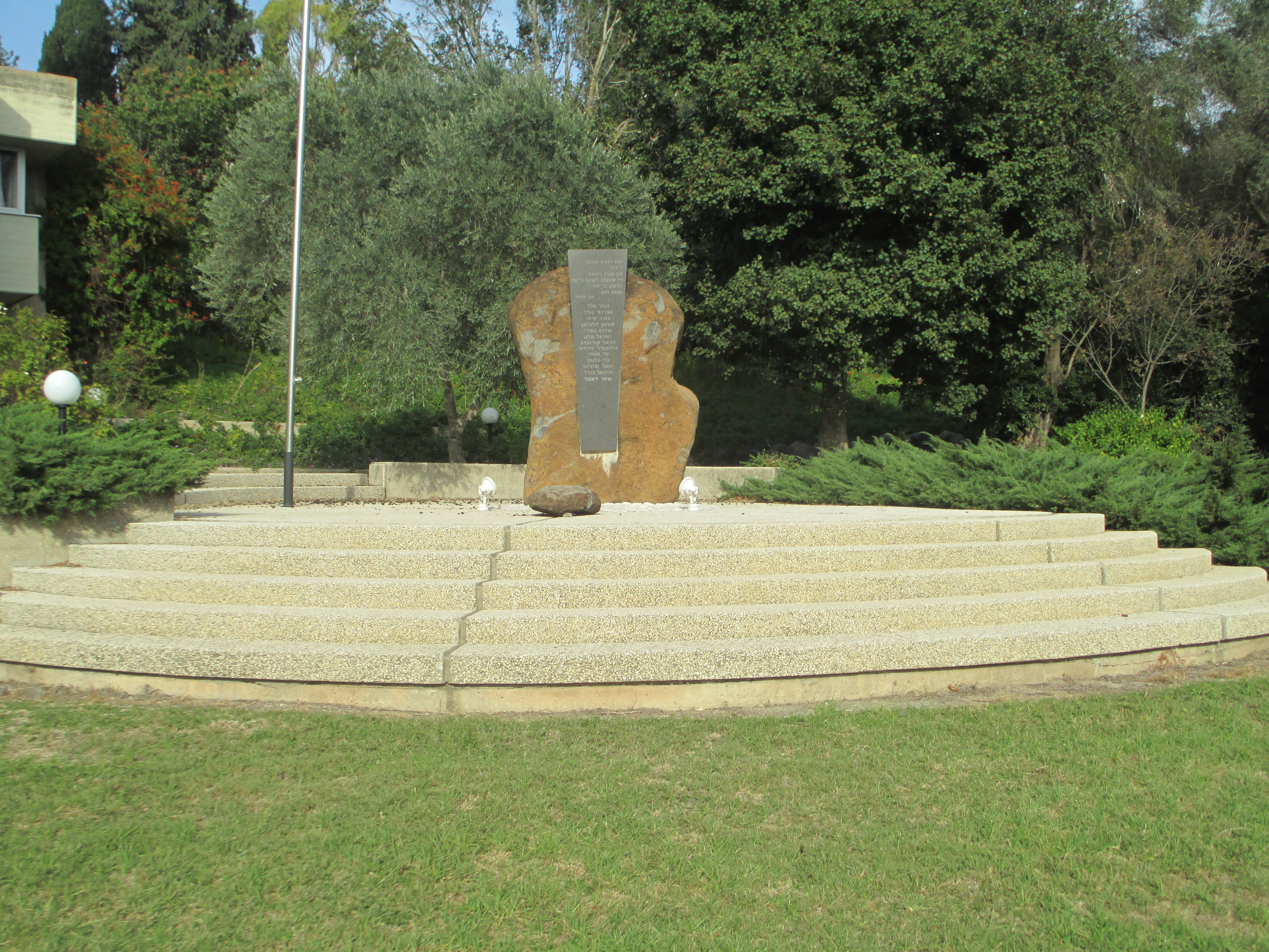 אנדרטה בגניגר לנופלים במערכות ישראל